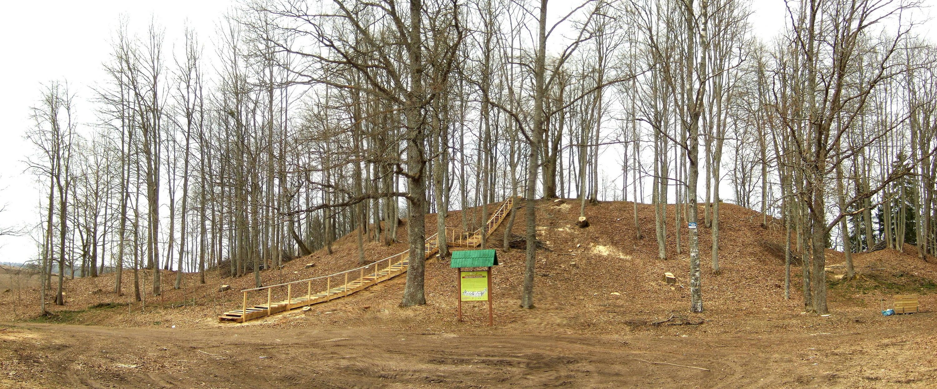 Cirkliškio piliakalnis